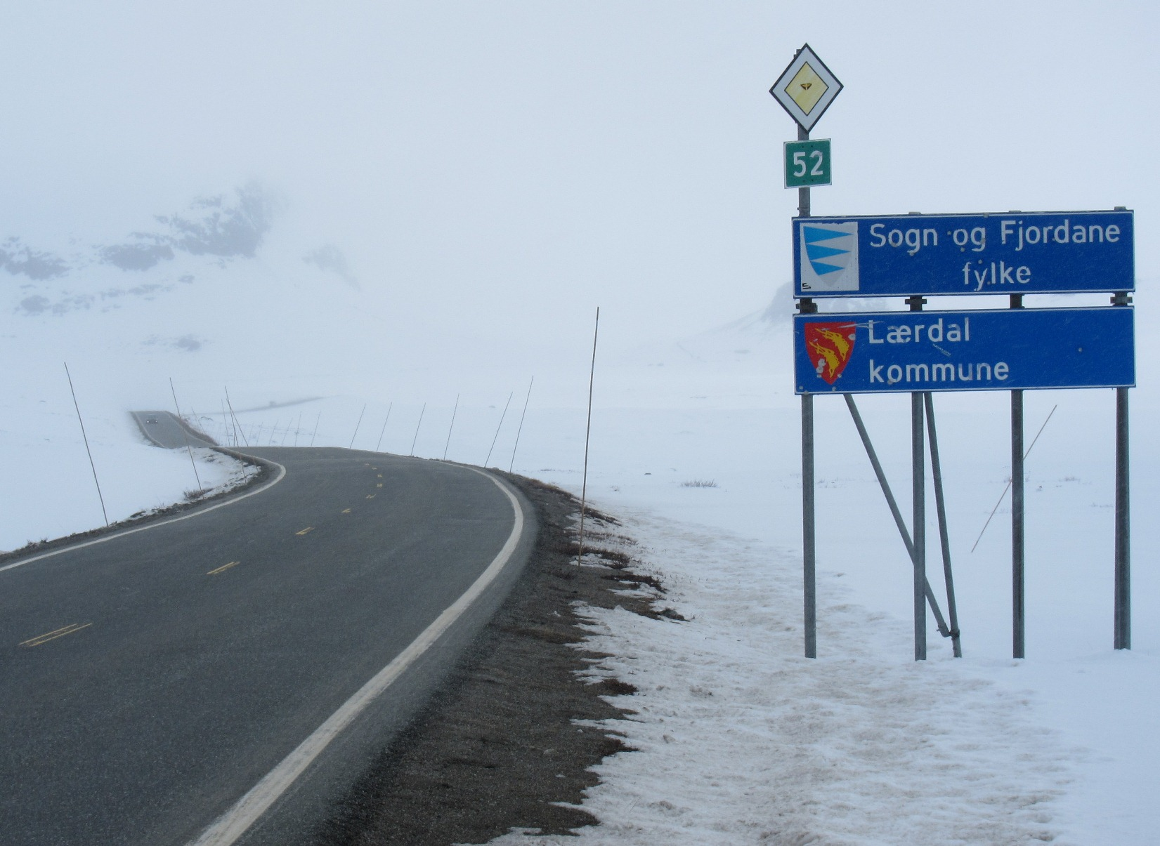 Hemsedalsfjellet på Riksveg 52 ved fylkesgrensa til Sogn og fjordane, med vegskilt.